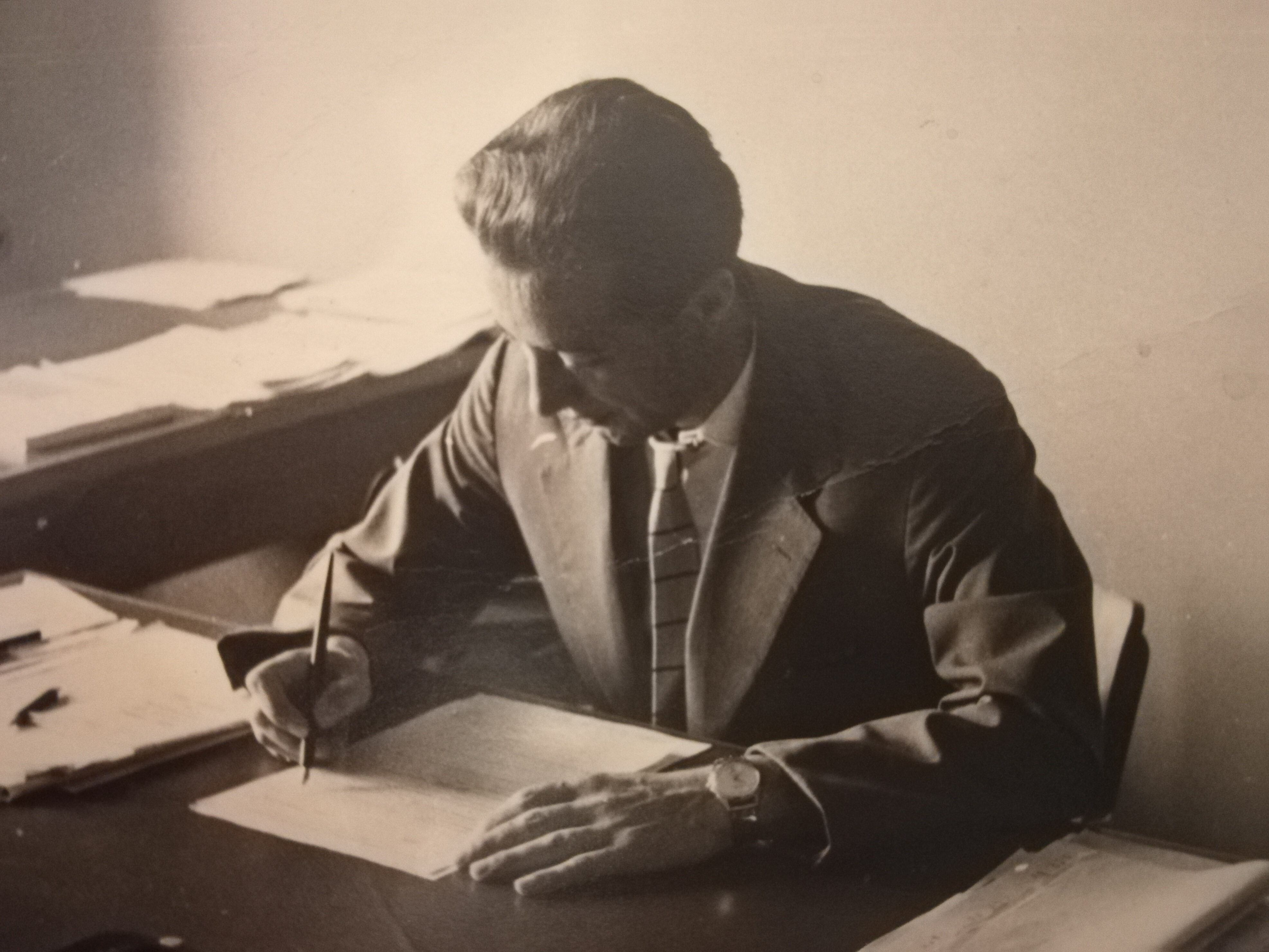 Lucio Balestrieri